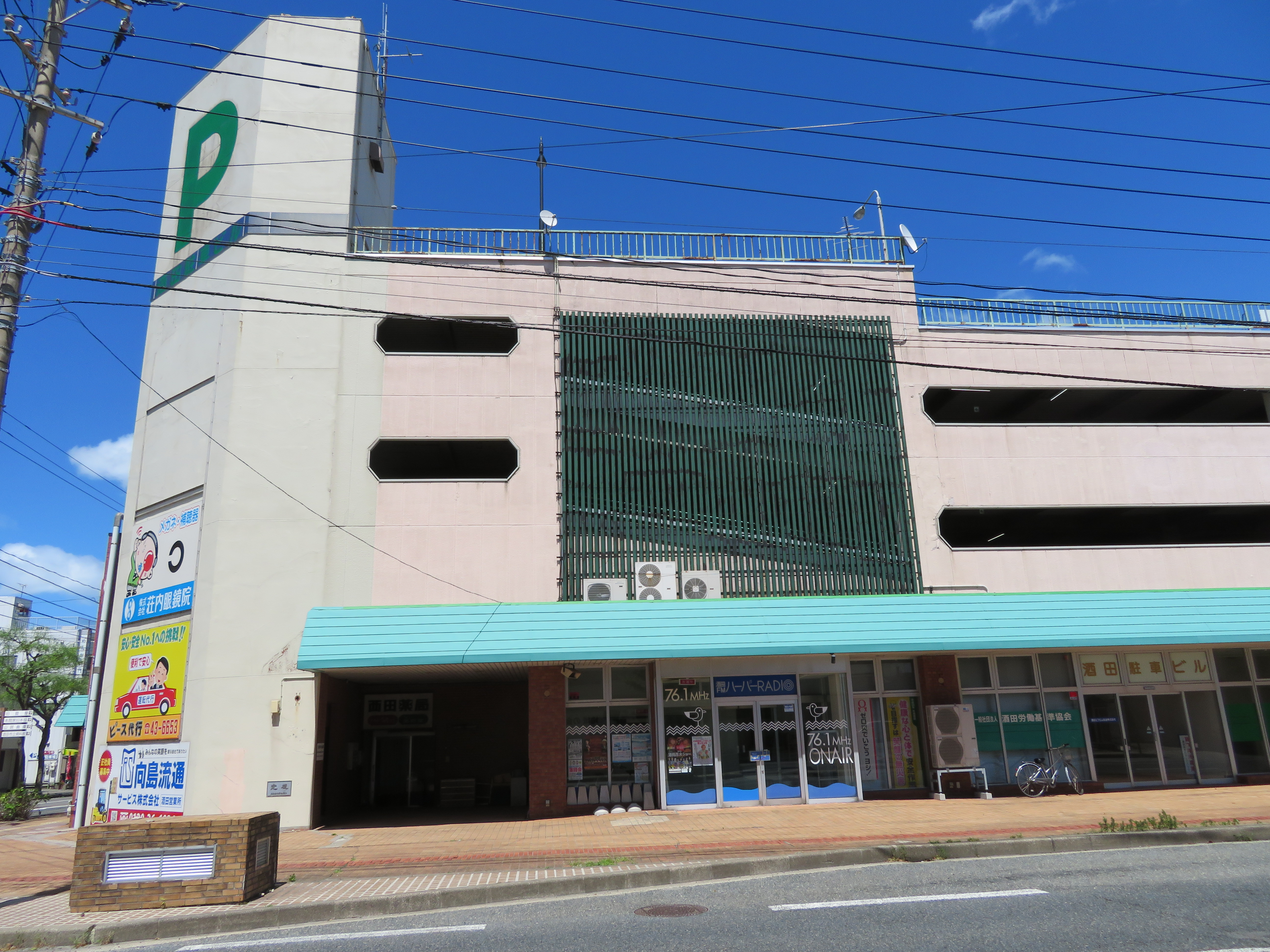 山形県酒田市に所在する酒田駐車ビル（建物南側から撮影） Canon PowerShot SX720 HS